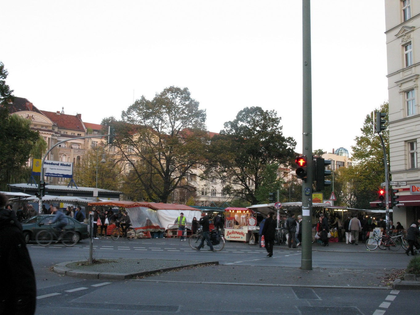 Markt am Maybachufer